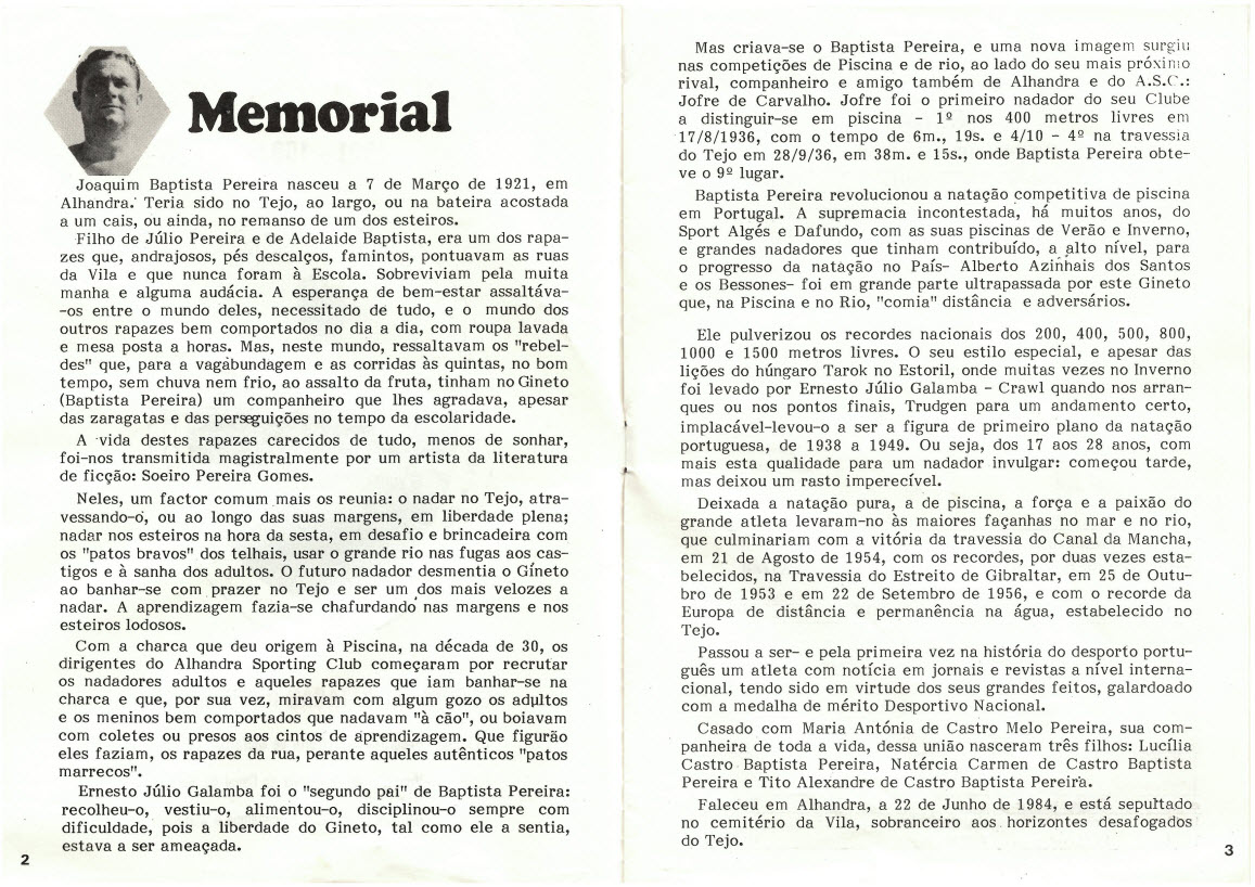 Texto sobre a vida e feitos de Baptista Pereira.